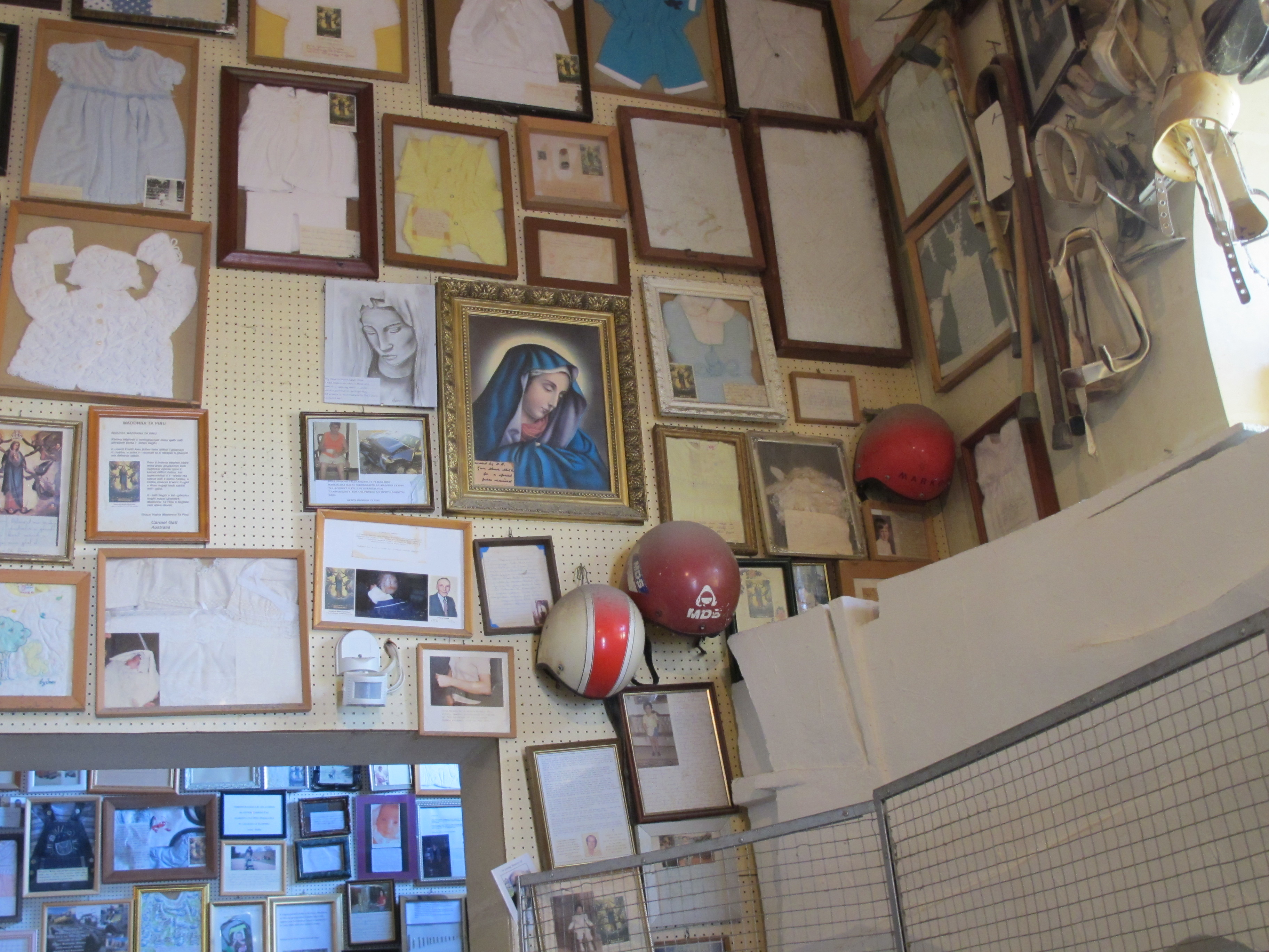 Dankesbezeugungen in der Wallfahrtskriche Ta' Pinu Nov 2014